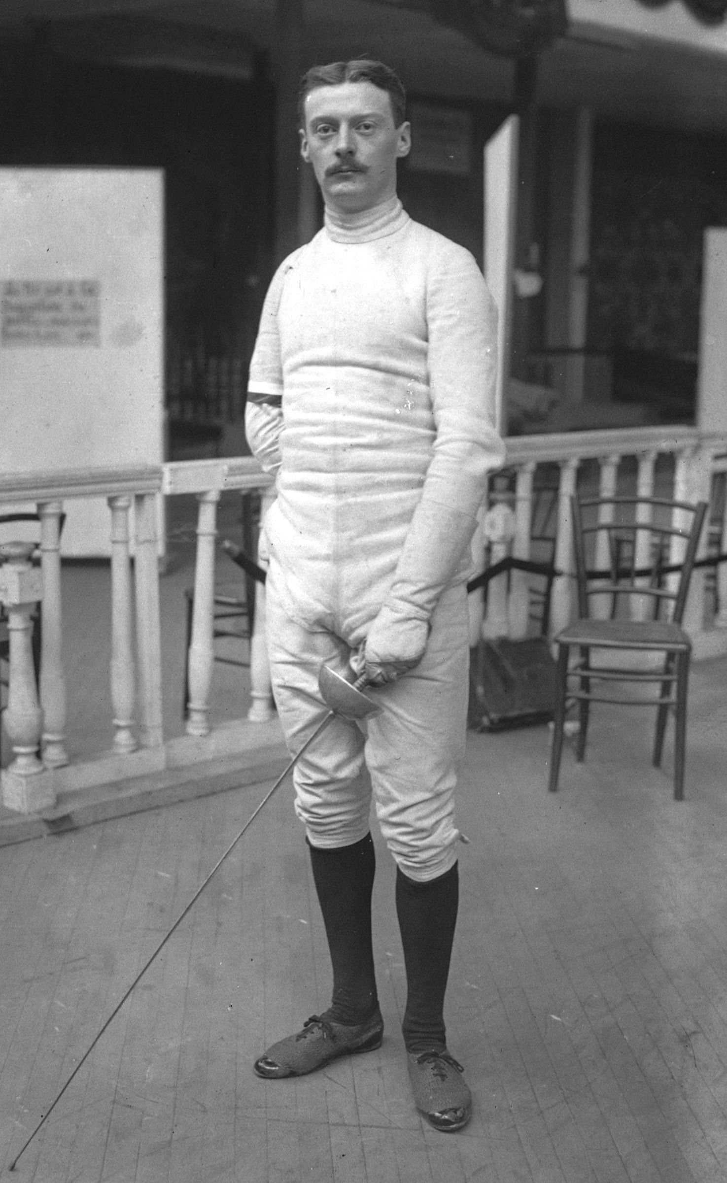 Lucien Gaudin, escrimeur.